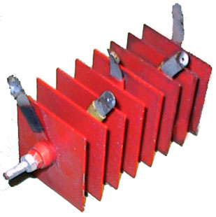 Redresseur au sélénium Illustration personnelle. Libre de droits. Lozère